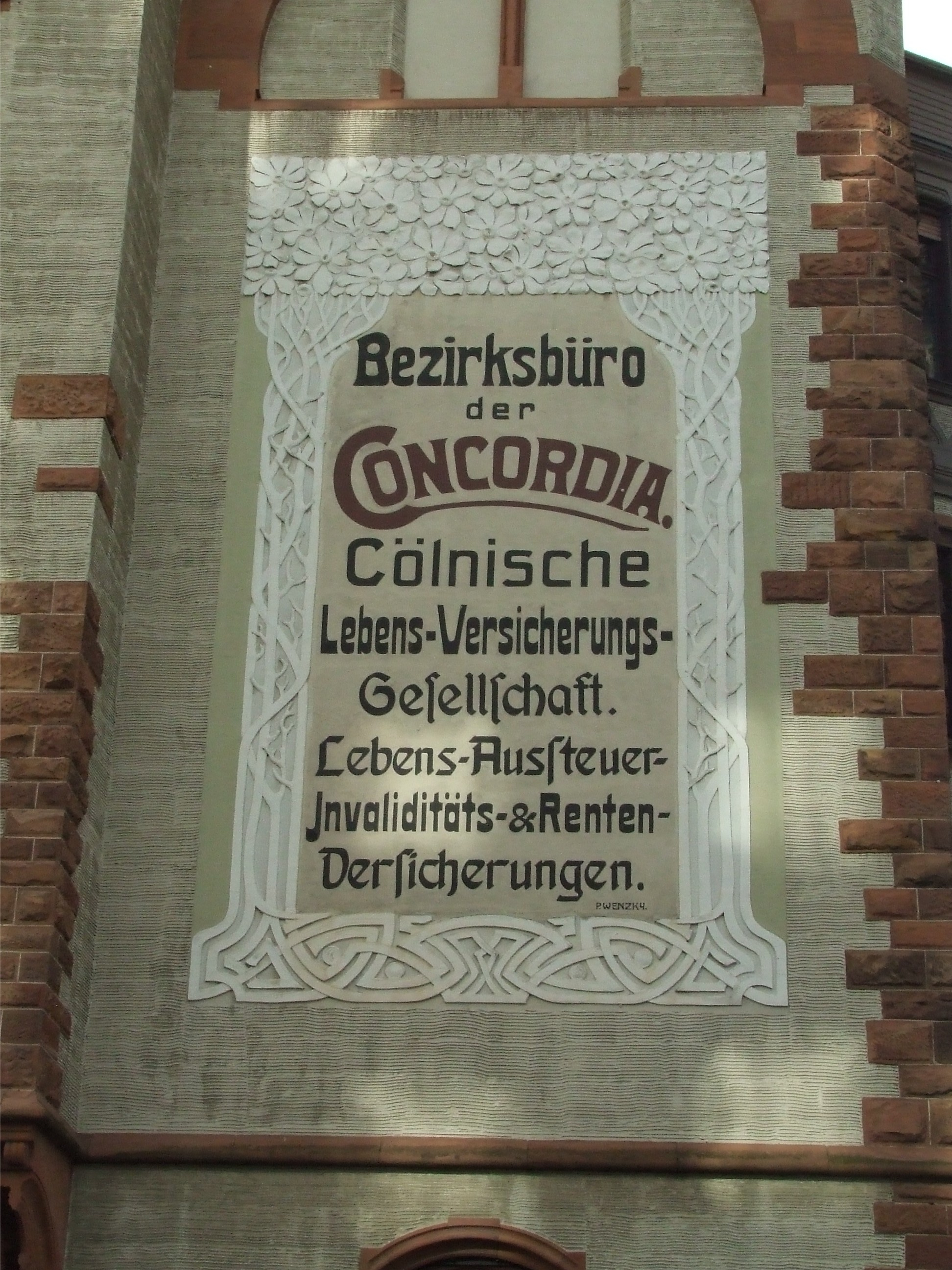 Kulturdenkmal, erbaut 1902: Einzig erhaltenes Beispiel einer in die Fassade integrierten qualitätvollen Werbeinschrift an der Kaiserstraße 70 in Mainz. Inschrift: Bezirksbüro der Concordia. – Cölnische Lebens-Verschicherungs-Gesellschaft. Lebens-Aussteuer-Jnvaliditäts-&Renten-Versicherungen. – P.Wenzky. (Concordia Lebensversicherung Köln, 1983 umbenannt in Colonia Lebensversicherung, später Axa)